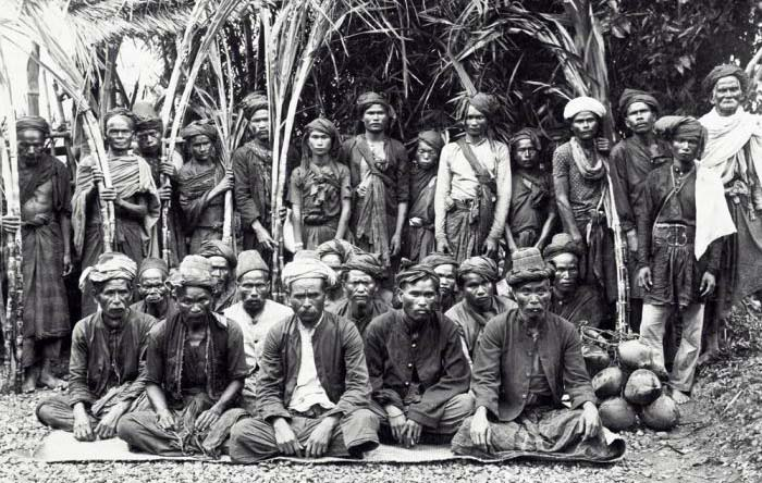 kutacane pemamanan